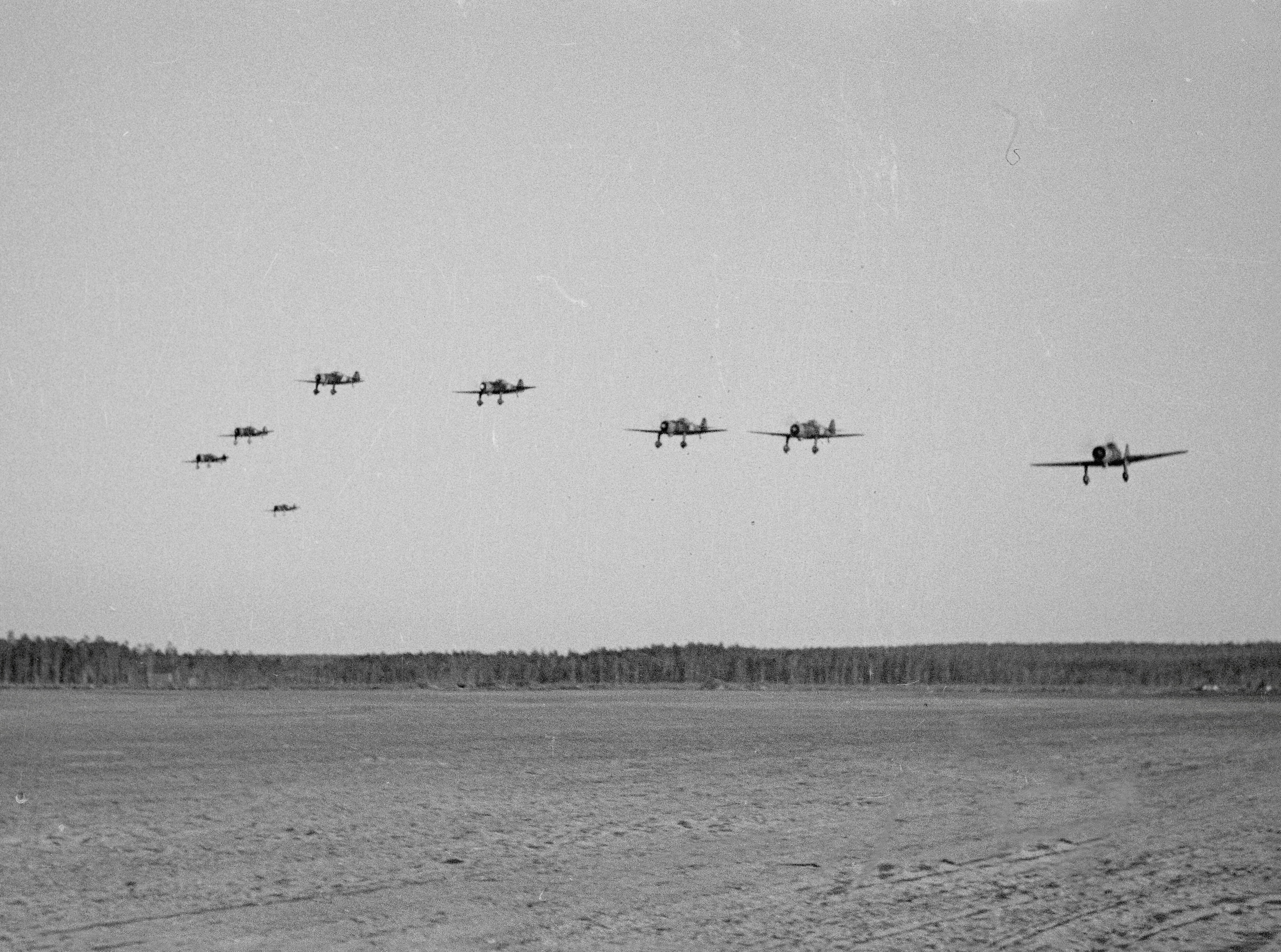 Yhdeksän maataistelukonetta on startannut tulokselliselle lennolleen vihollisen puolelle Tiiksjärven lentokentältä. (Kuvassa on Fokker D.XXI -hävittäjiä). Kuvauspaikka: Tiiksjärvi